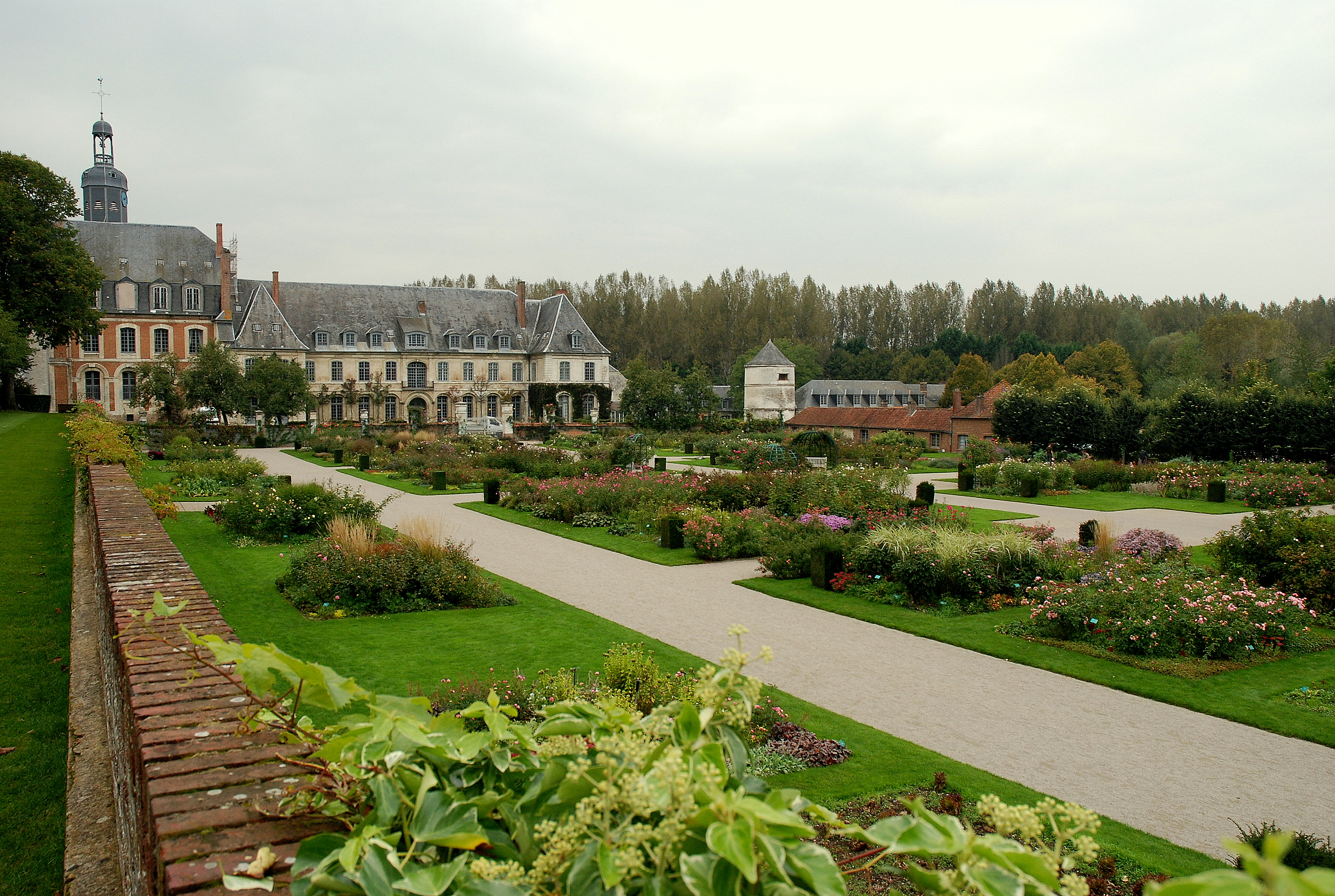 l'abbaye de Valloires à Argoules, France